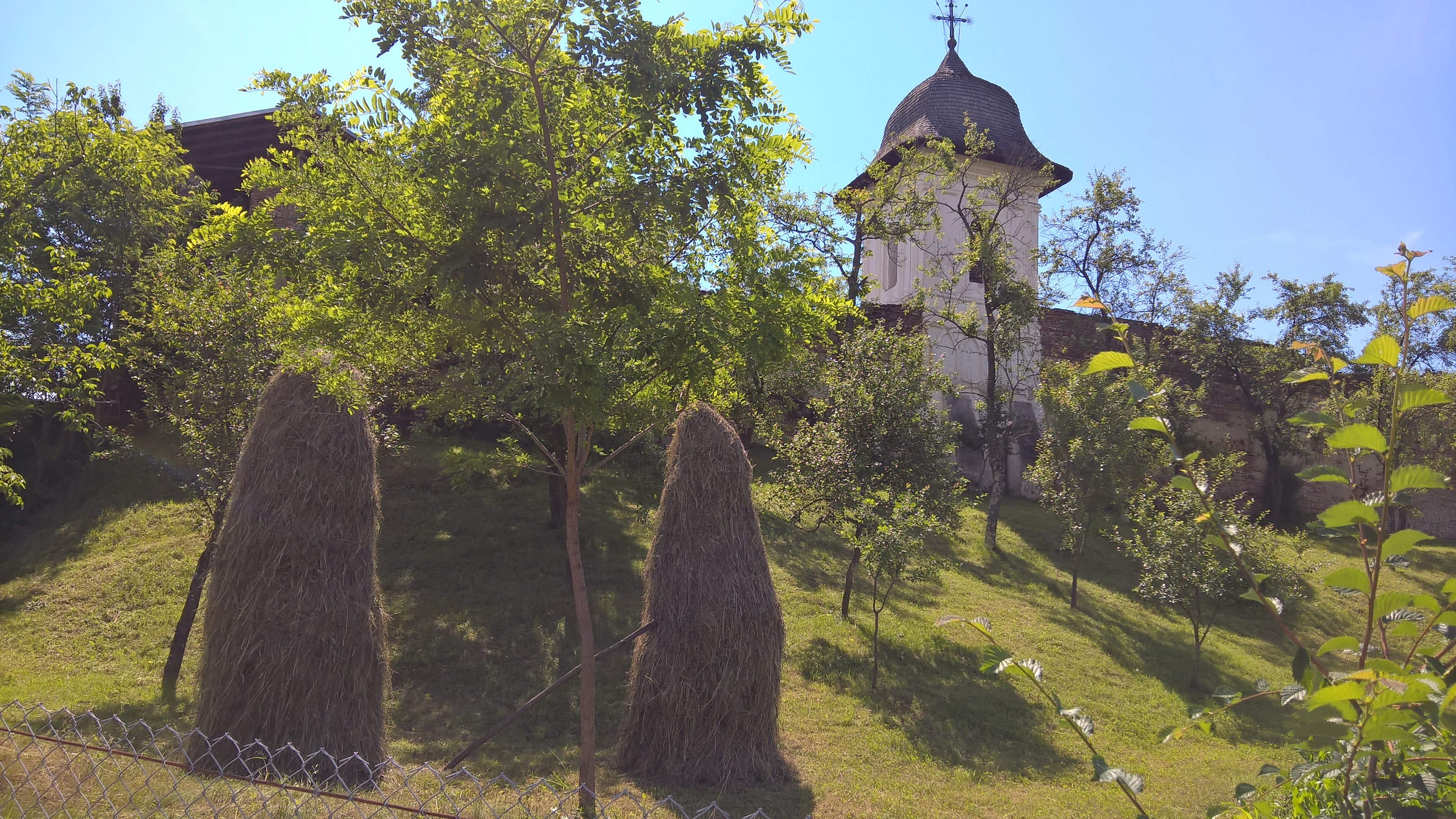 Turn clopotniță 03